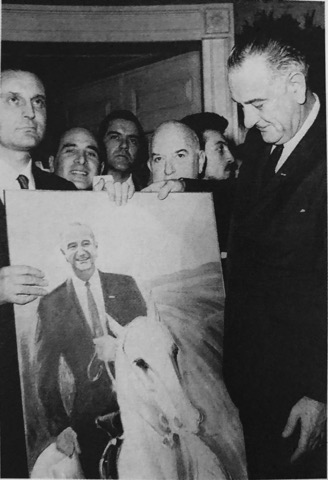 Fotografia che ritrae il Presidente Johnson (a destra), Aldo Matteotti (a sinistra) nel momento del dono del ritratto.